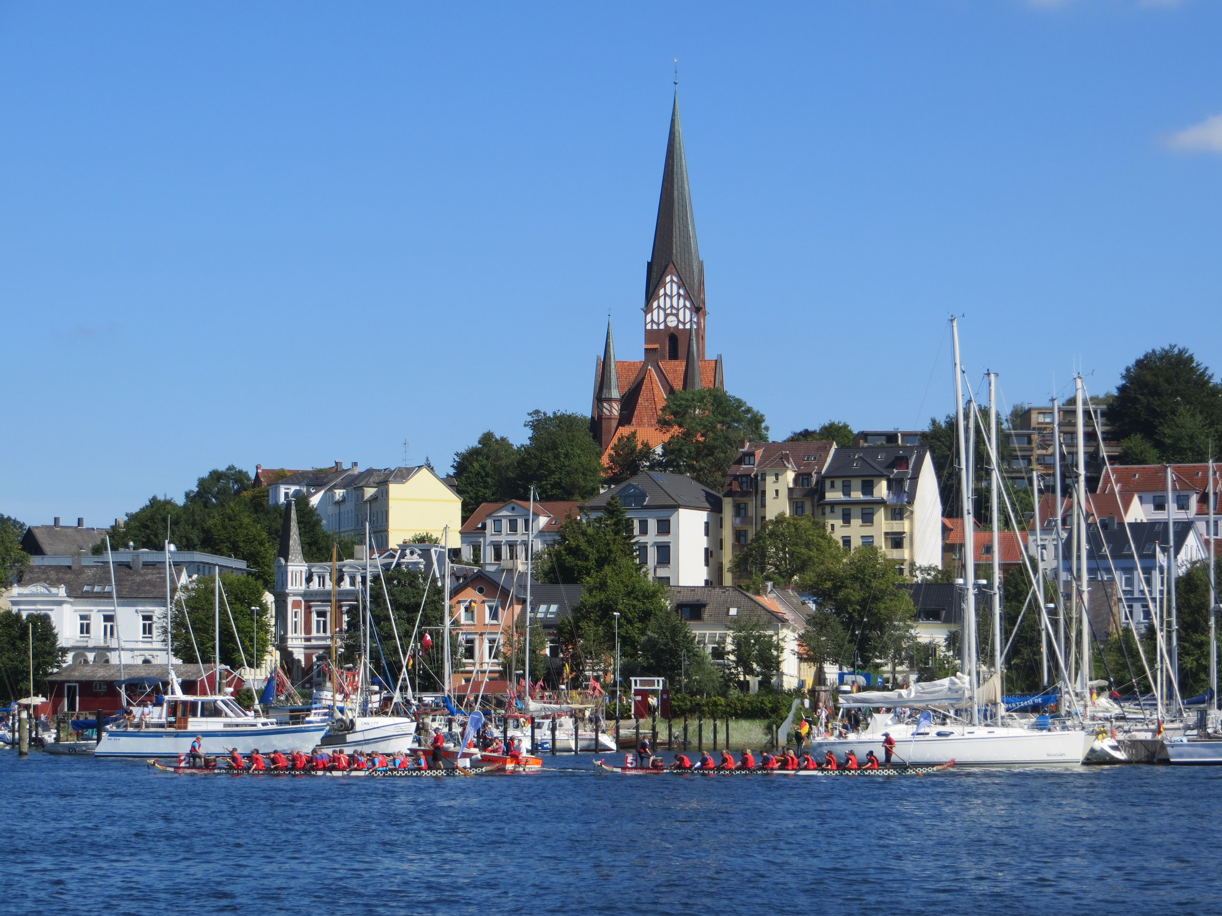 Flensburger Hafen mit Drachenboote und St. Jürgen-Kirche im Hintergrund (Flensburg 2013), Bild 03